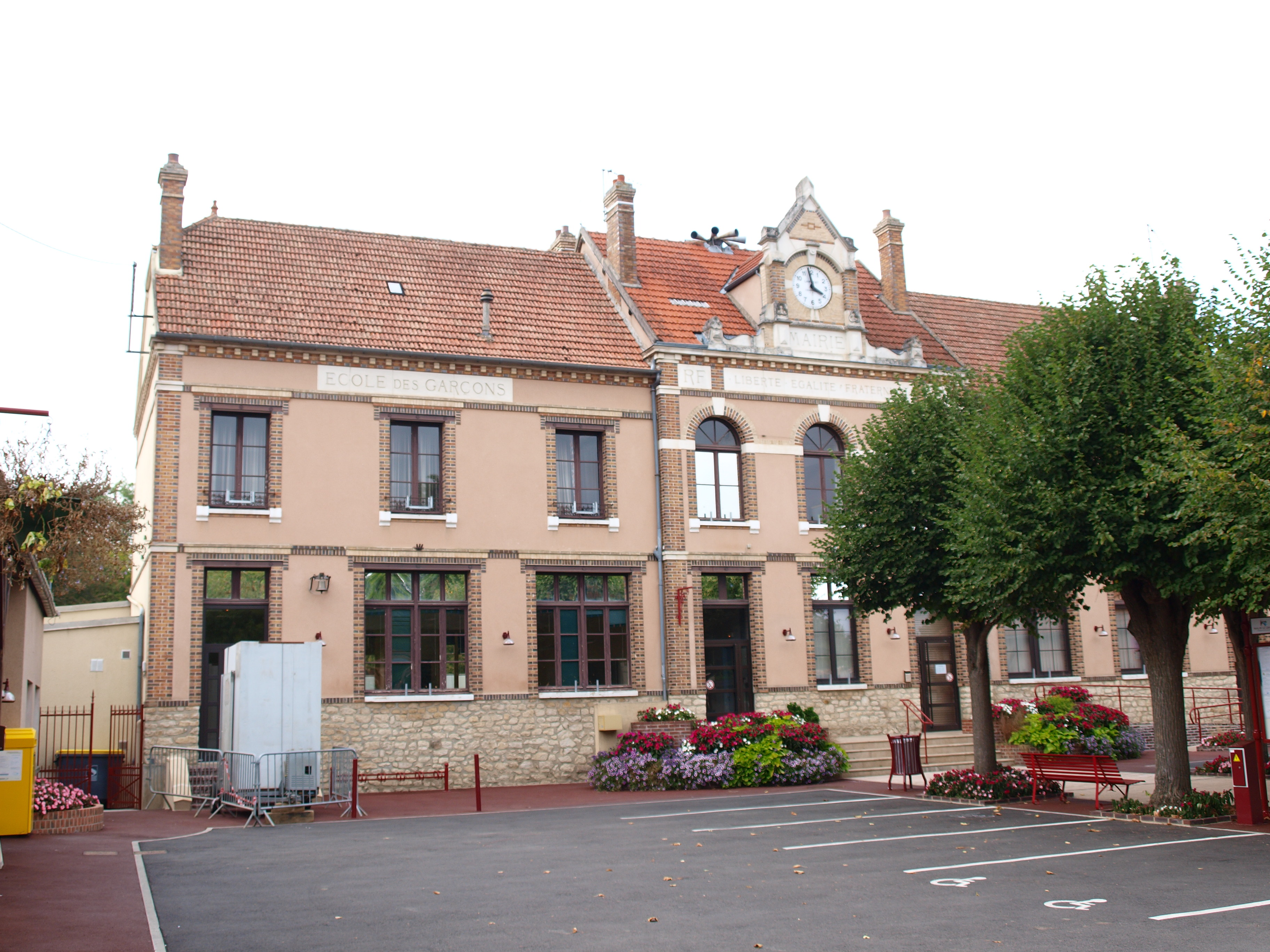 Malay-le-Grand (Yonne, France) ; mairie